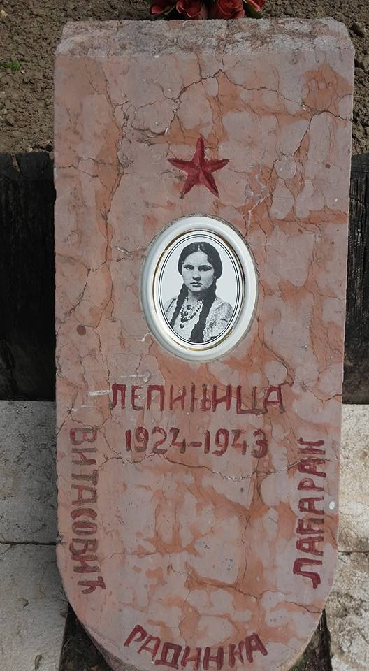 Grob Radinke Vitasović Lepinjice na Širokom dolu na Fruškoj gori